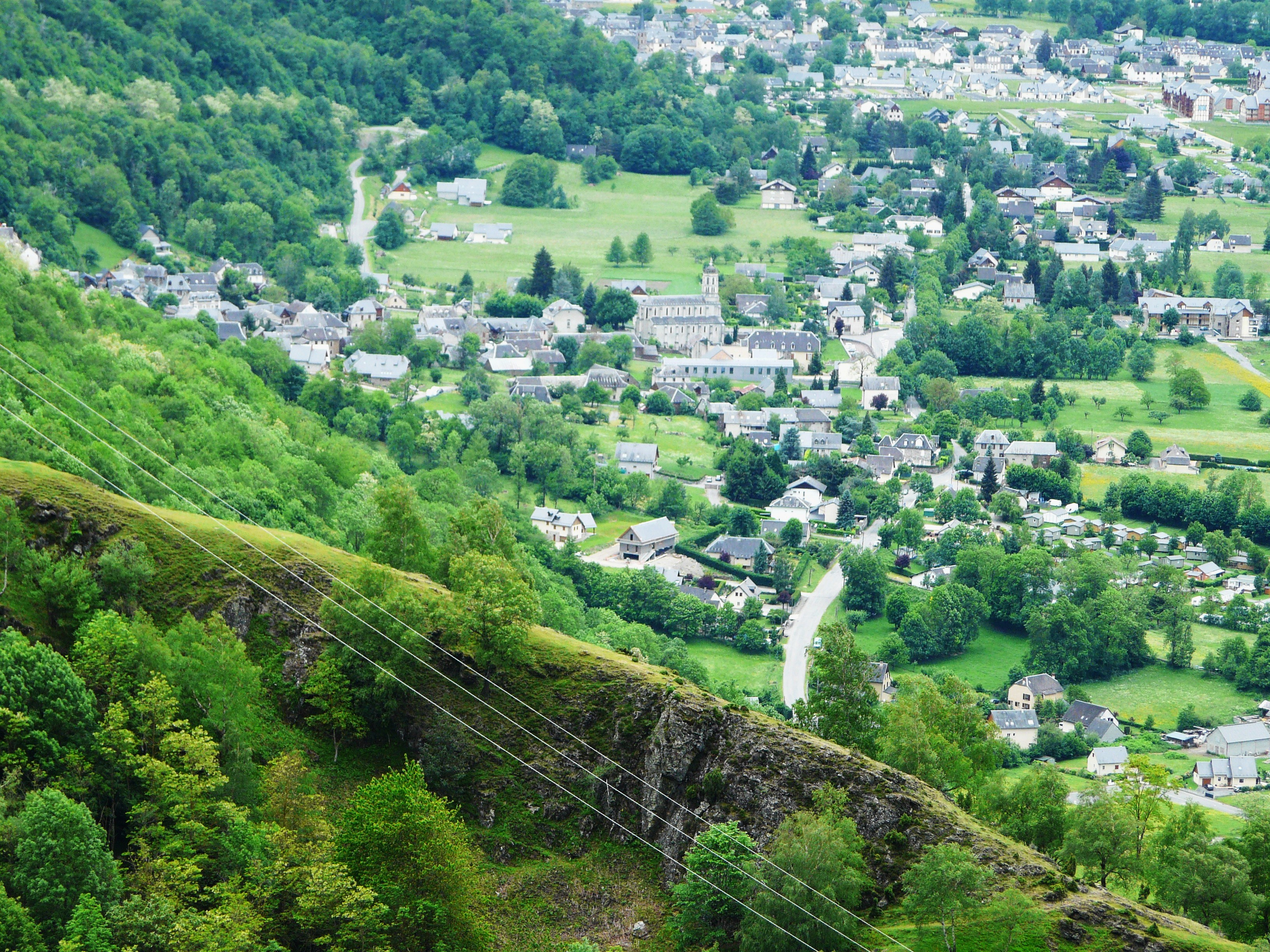 Le village de Montauban-de-Luchon vu depuis le nord, Haute-Garonne, France.